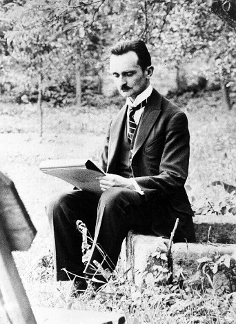 Jaroslav Král (1883-1942), český malíř a kreslíř